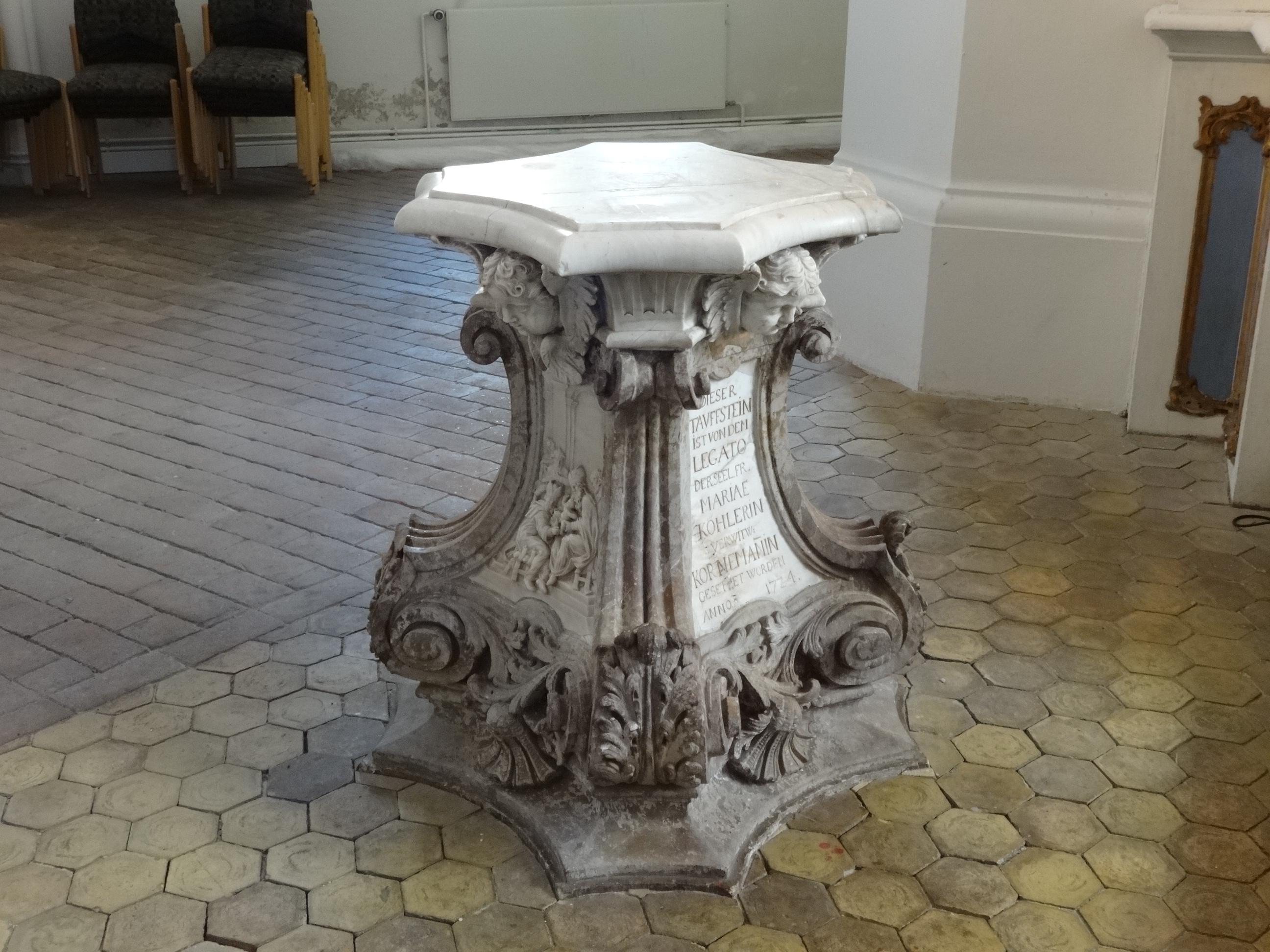 St. Jacobi, evangelische Stadtkirche in Nauen, Havelland, Brandenburg